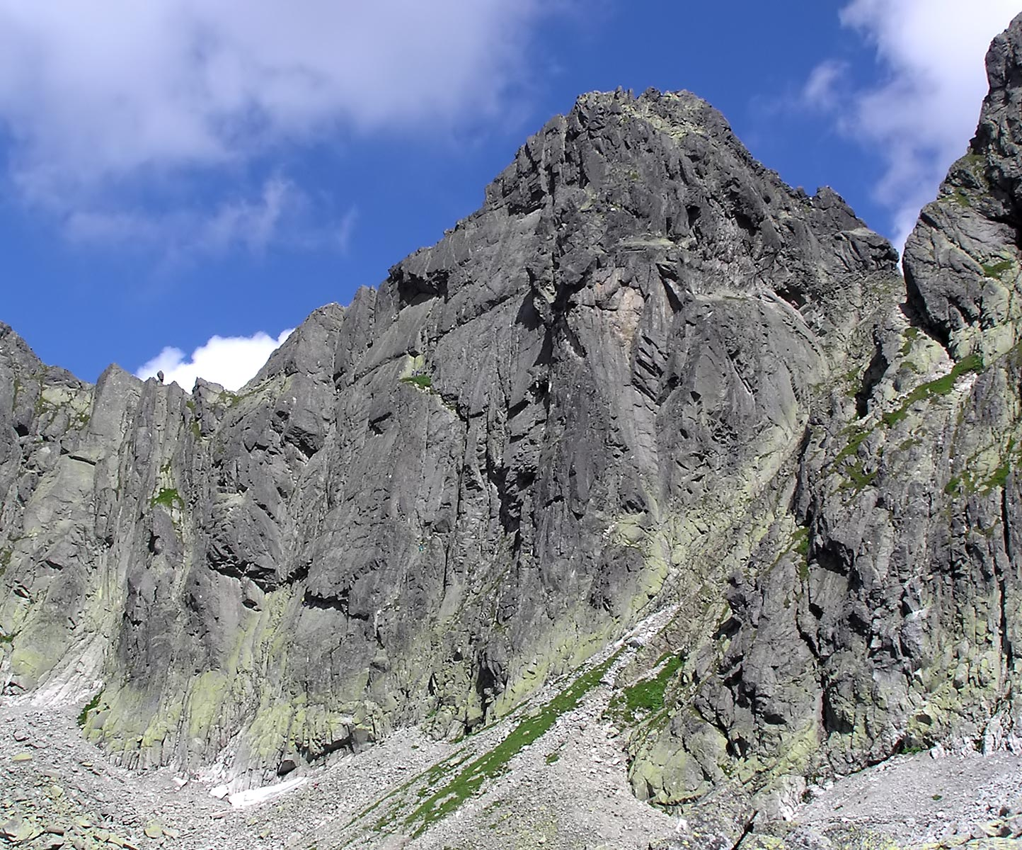 Opancerzona płytami południowa ściana Zamarłej Turni widziana z dolinki Pustej. Po lewej Zmarzła Przełęcz z charakterystycznym głazem - chłopkiem. Po prawej, nieco zasłonięta skalnym żebrem spadającym z Kozich Czub znajduje się Kozia Przełęcz. W ścianie można wypatrzeć cztery zespoły wspinaczkowe. Jestem autorem zdjęcia i udostępniam je na licencji: PD. Andrzej Makarczuk